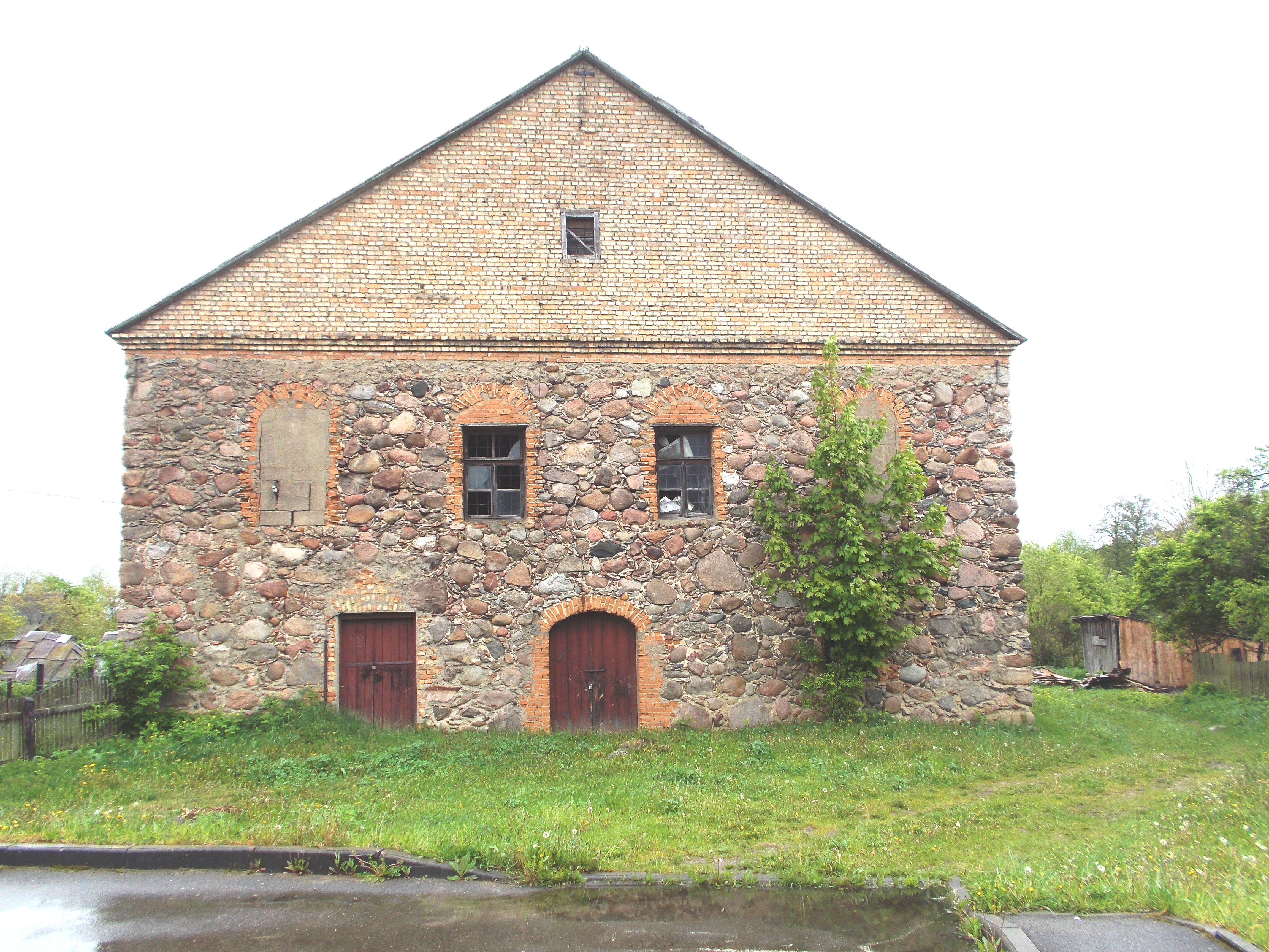 Синагога в Порозово (Гродненская область).